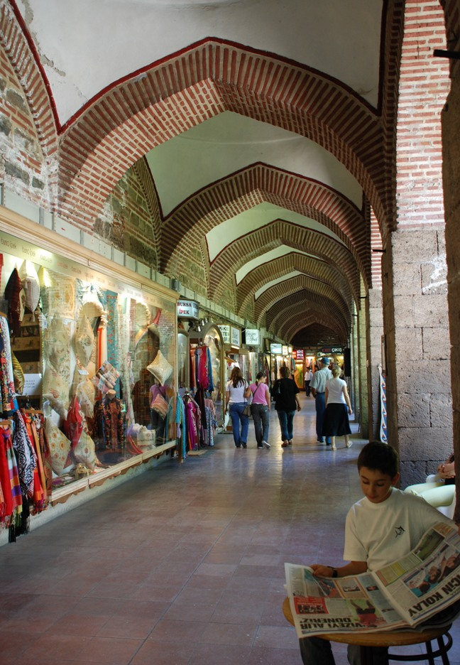 Bursa Eski Ipek Hanı